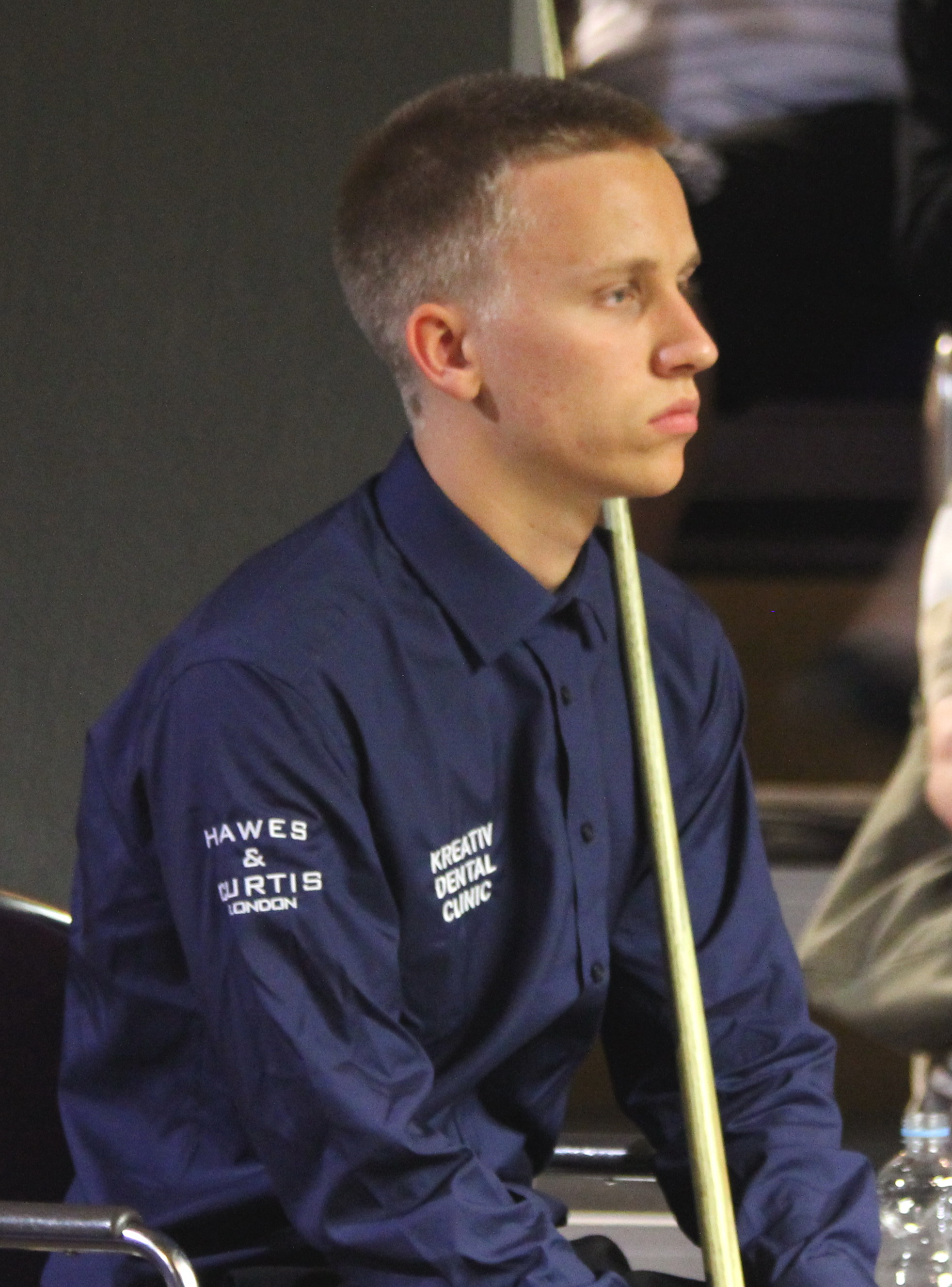 Kacper Filipiak beim Paul Hunter Classic 2015